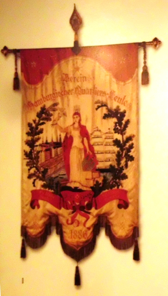 Fahne von 1886 der Hamburger Quartiersleute